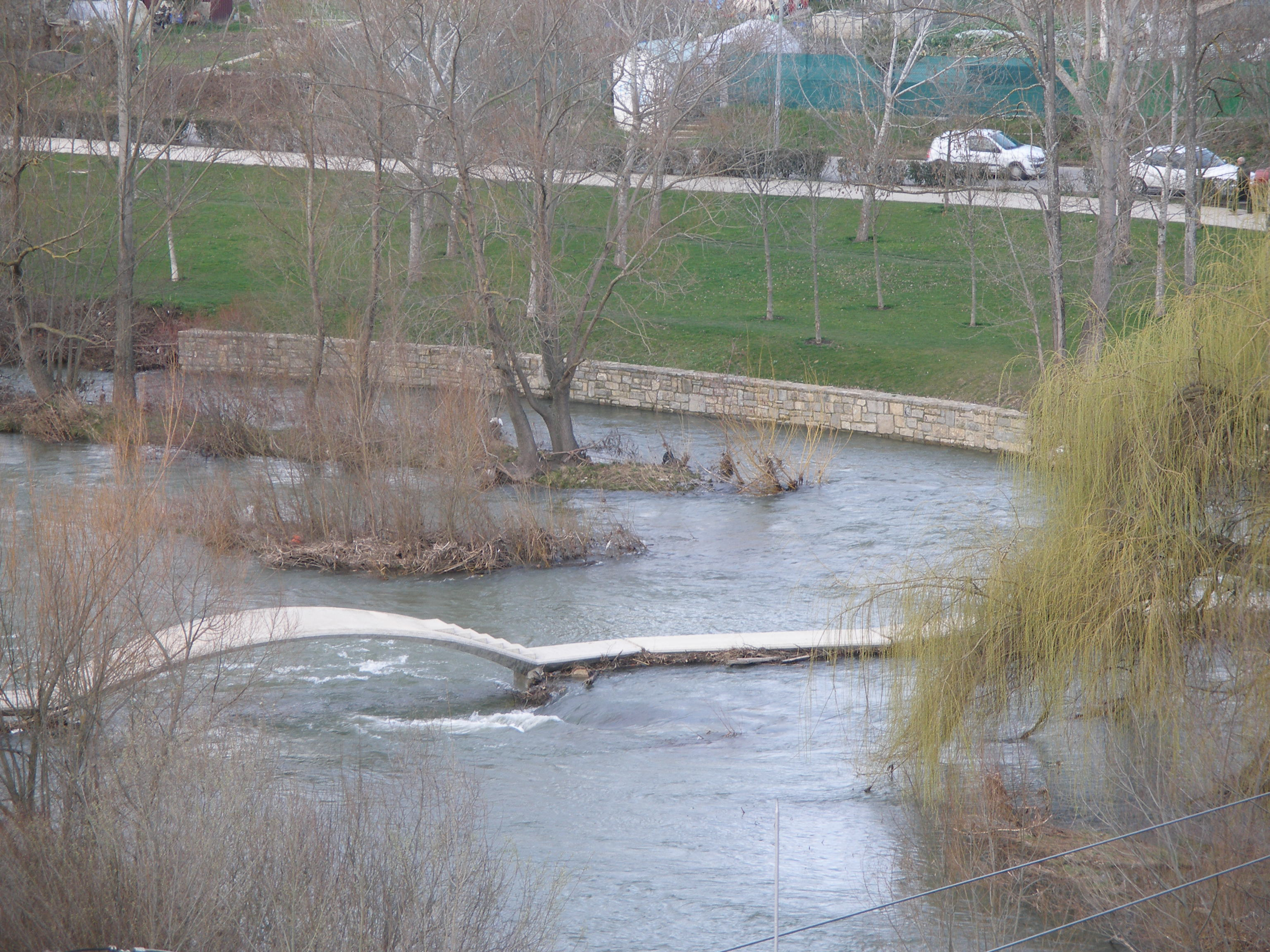 Rio Arga a su paso por Pamplona